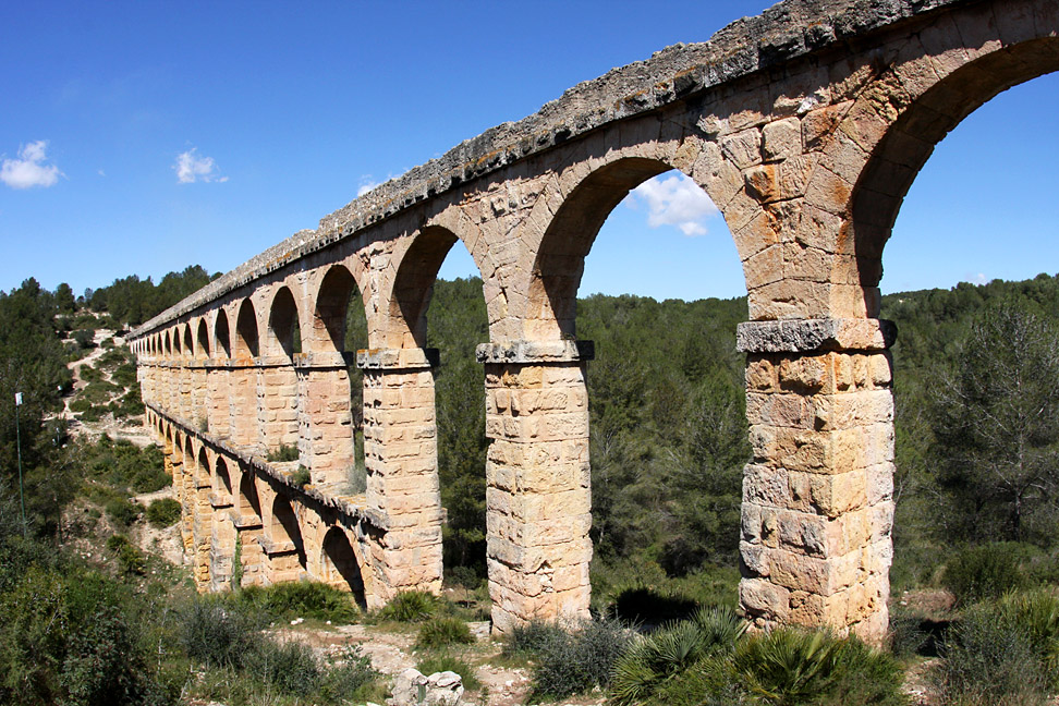 Vista del Puente del Diablo cerca de Tarragona